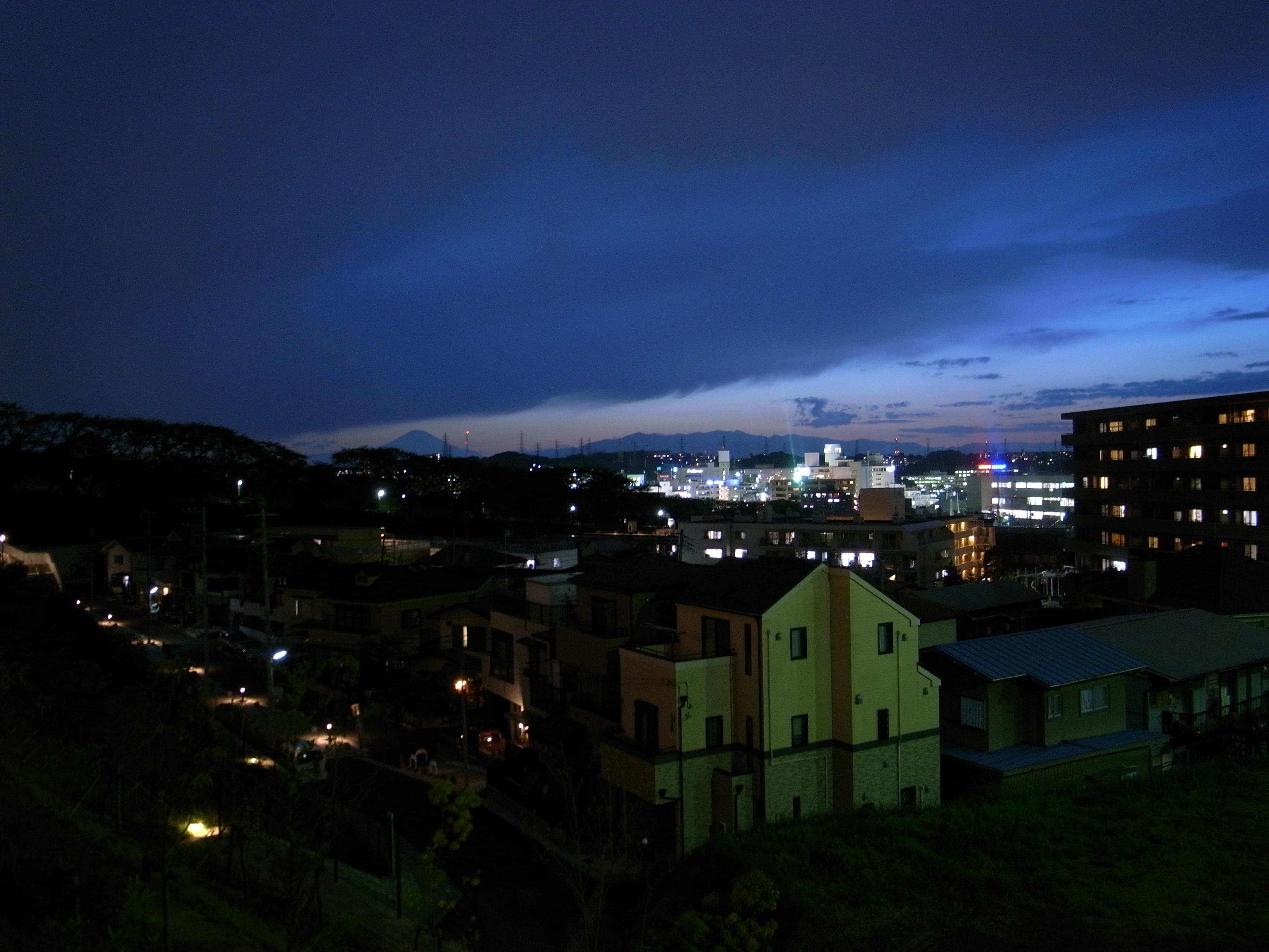 Yokohama Totsuka Night View / 横浜 戸塚 夕景